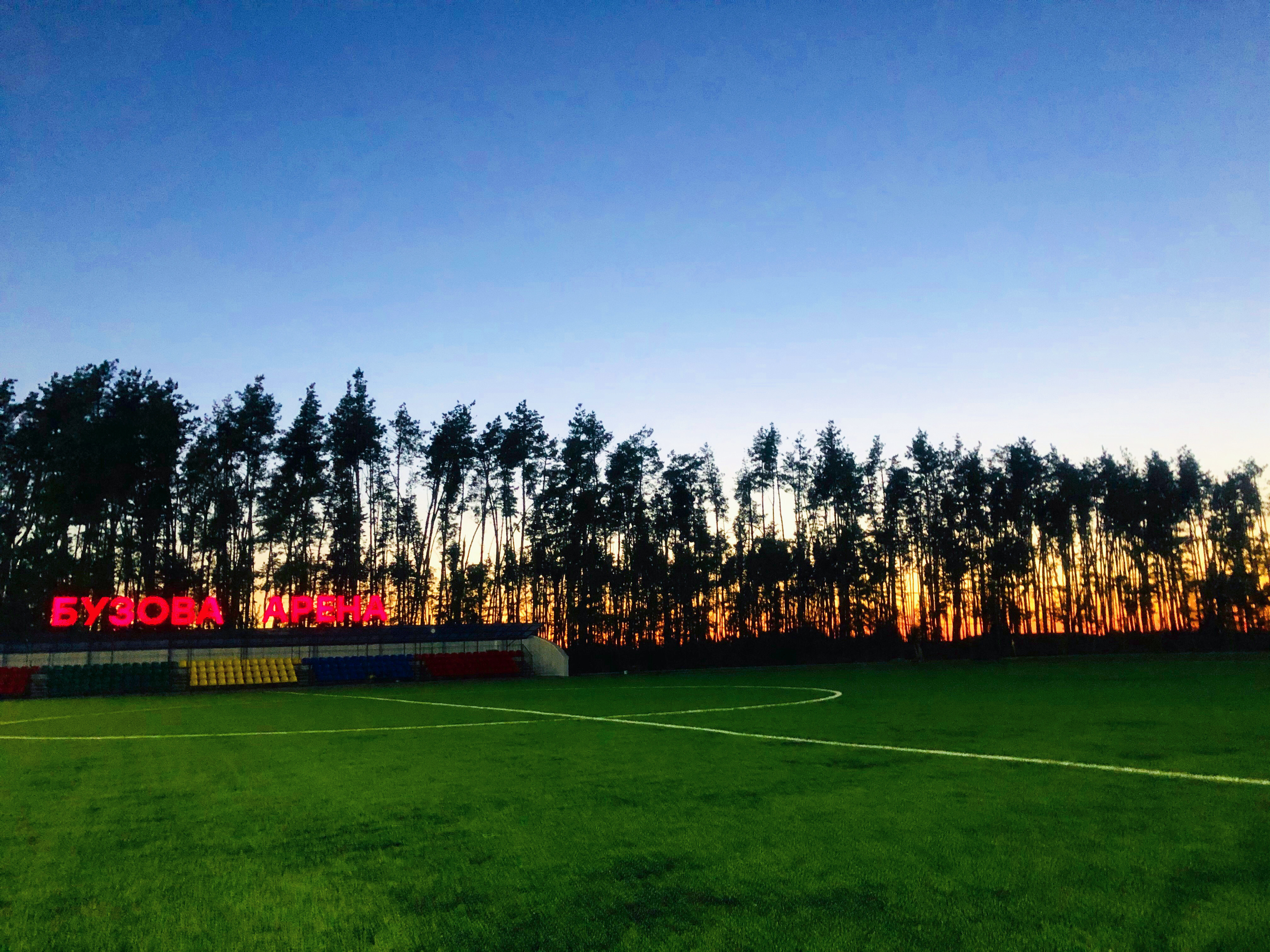 Стадіон "Бузова Арена" футбольного клубу "Нива" Бузова